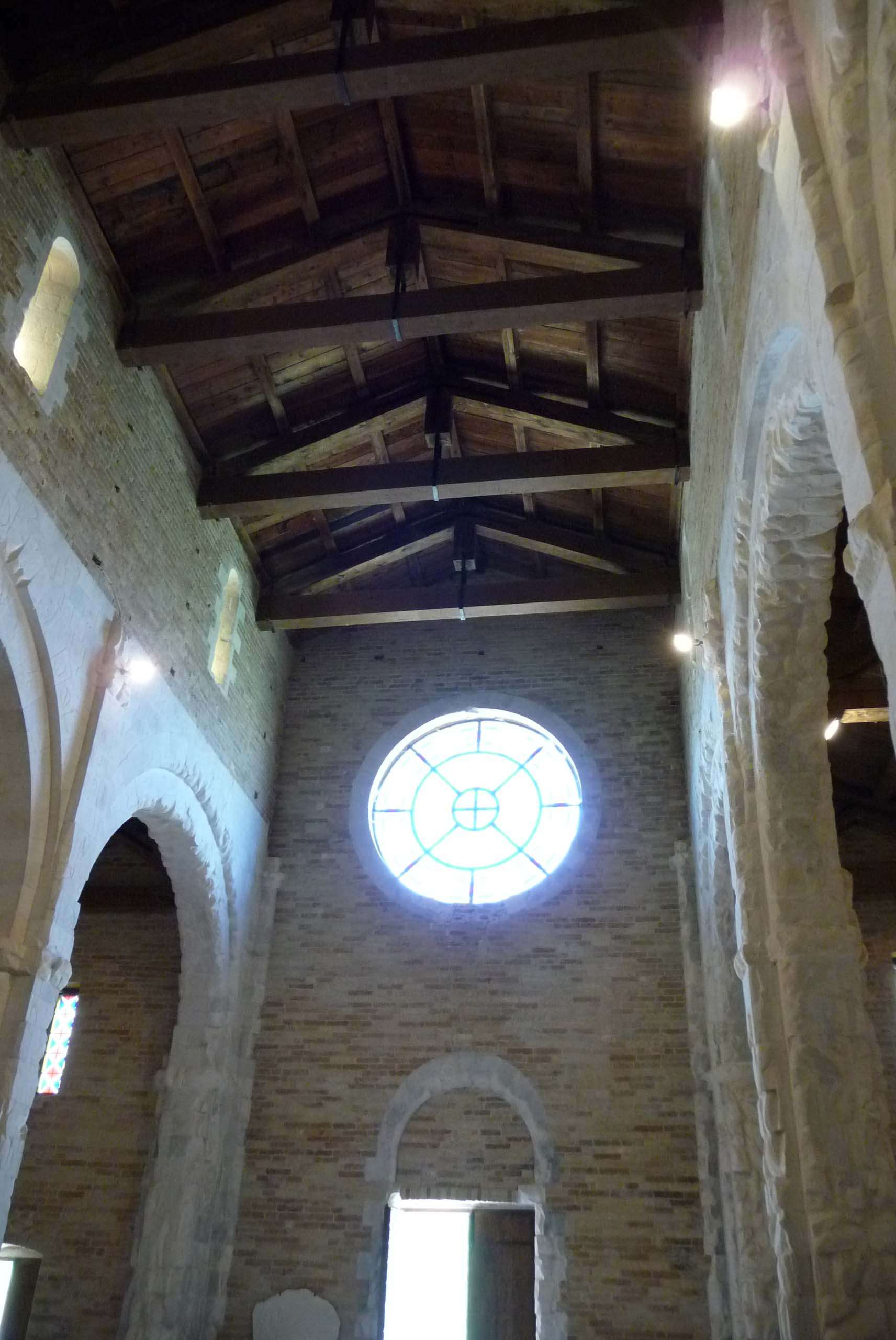 Chiesa di Santa Maria di Ronzano, controfacciata